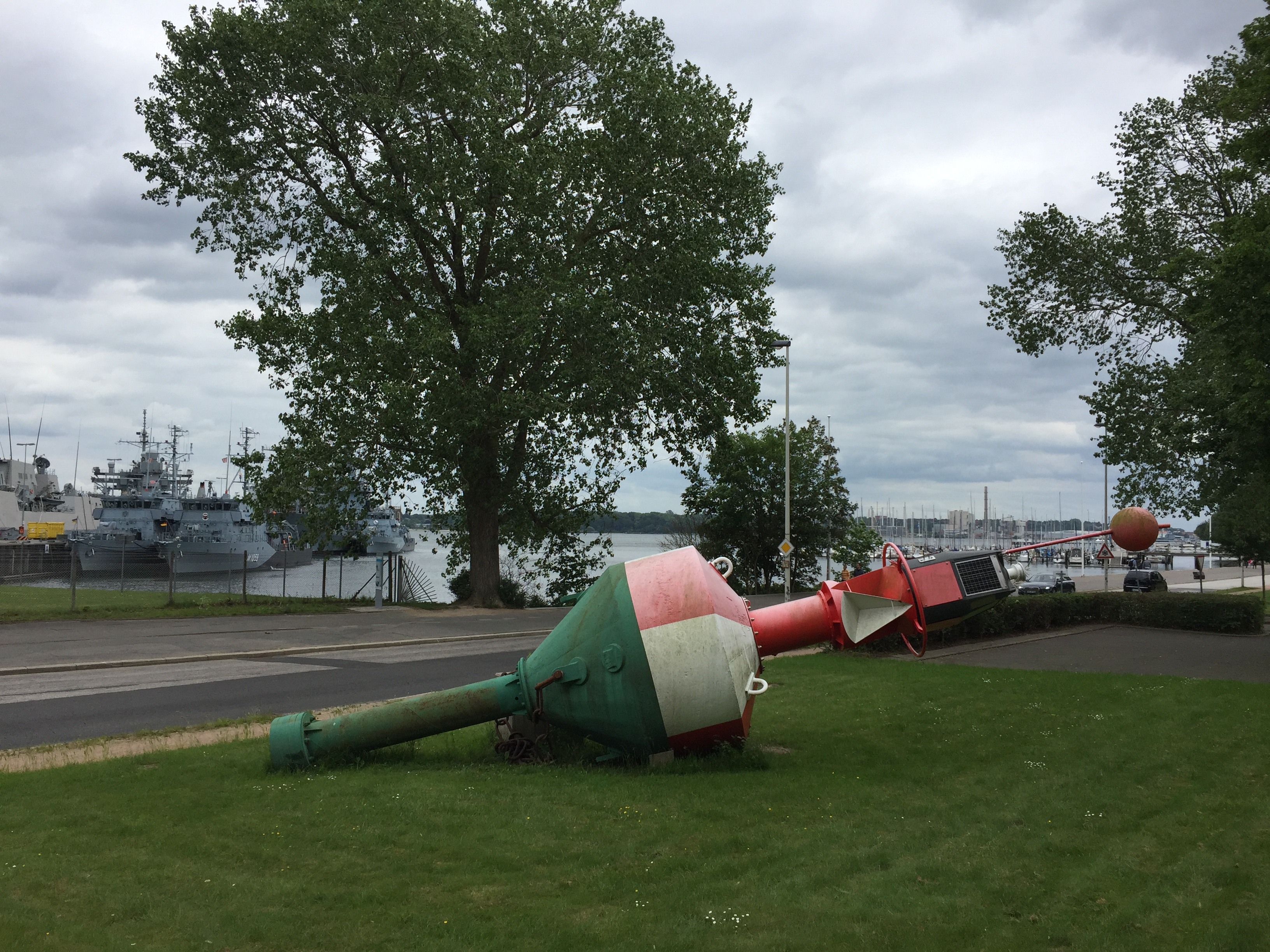 Boje vor WSD Nord in Kiel (Kiellinie)